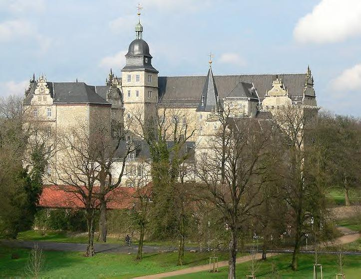 Schloss Wolfsburg